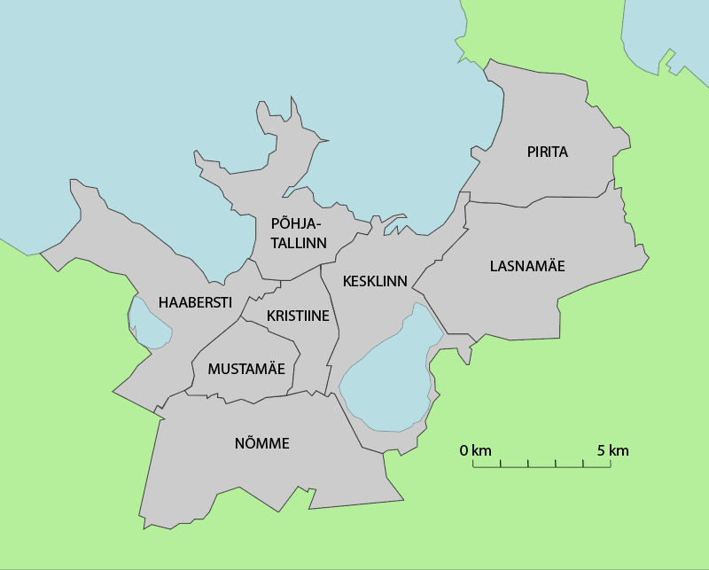 Lihtne kaart Tallinna linnaosade paiknemisest.